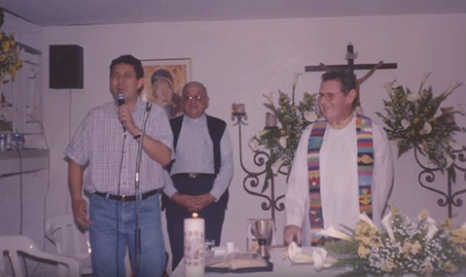 David Kapkin en compañía del teólogo Oscar Henao durante la celebración eucaristica